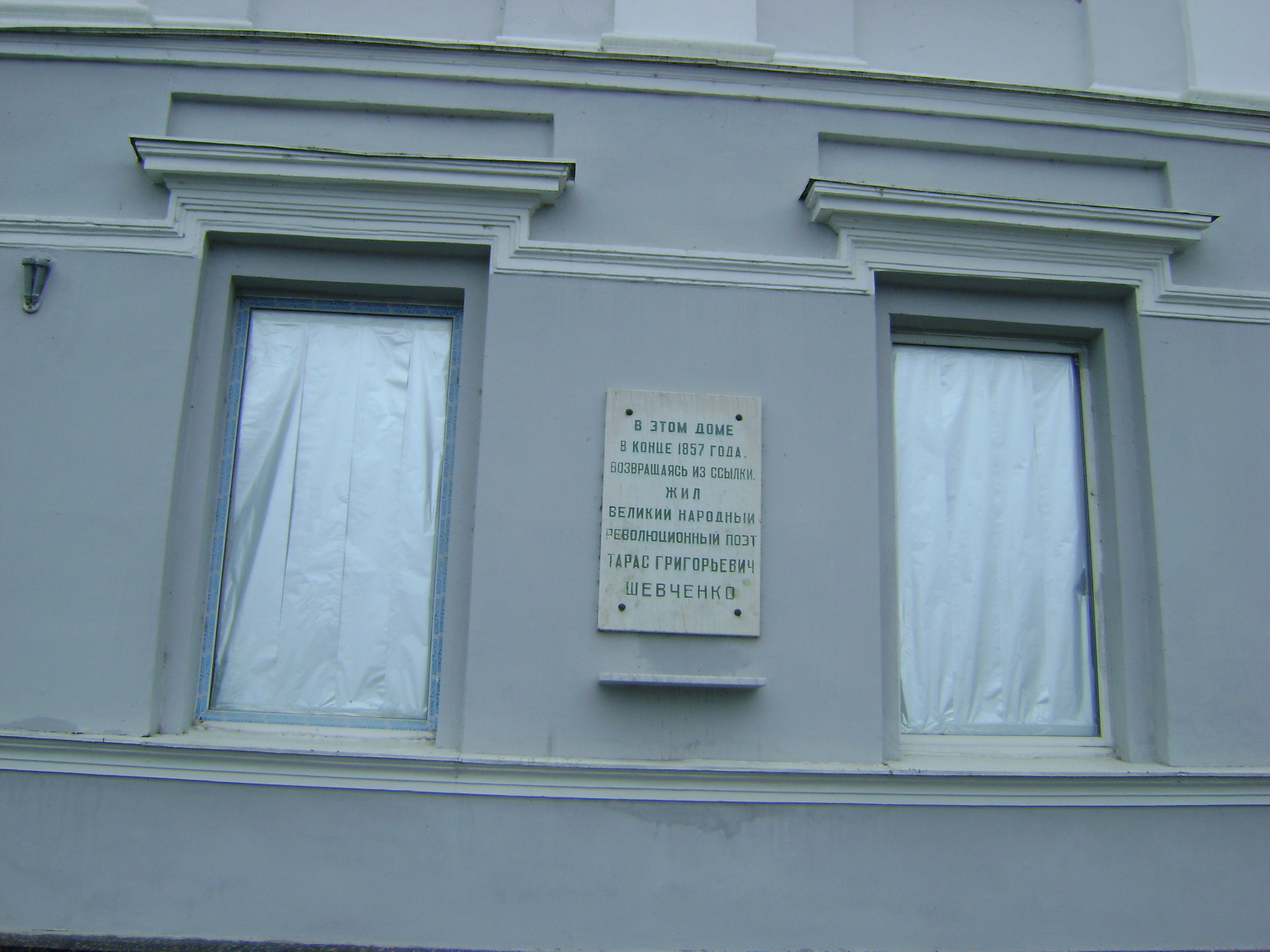 Набережна Волги.